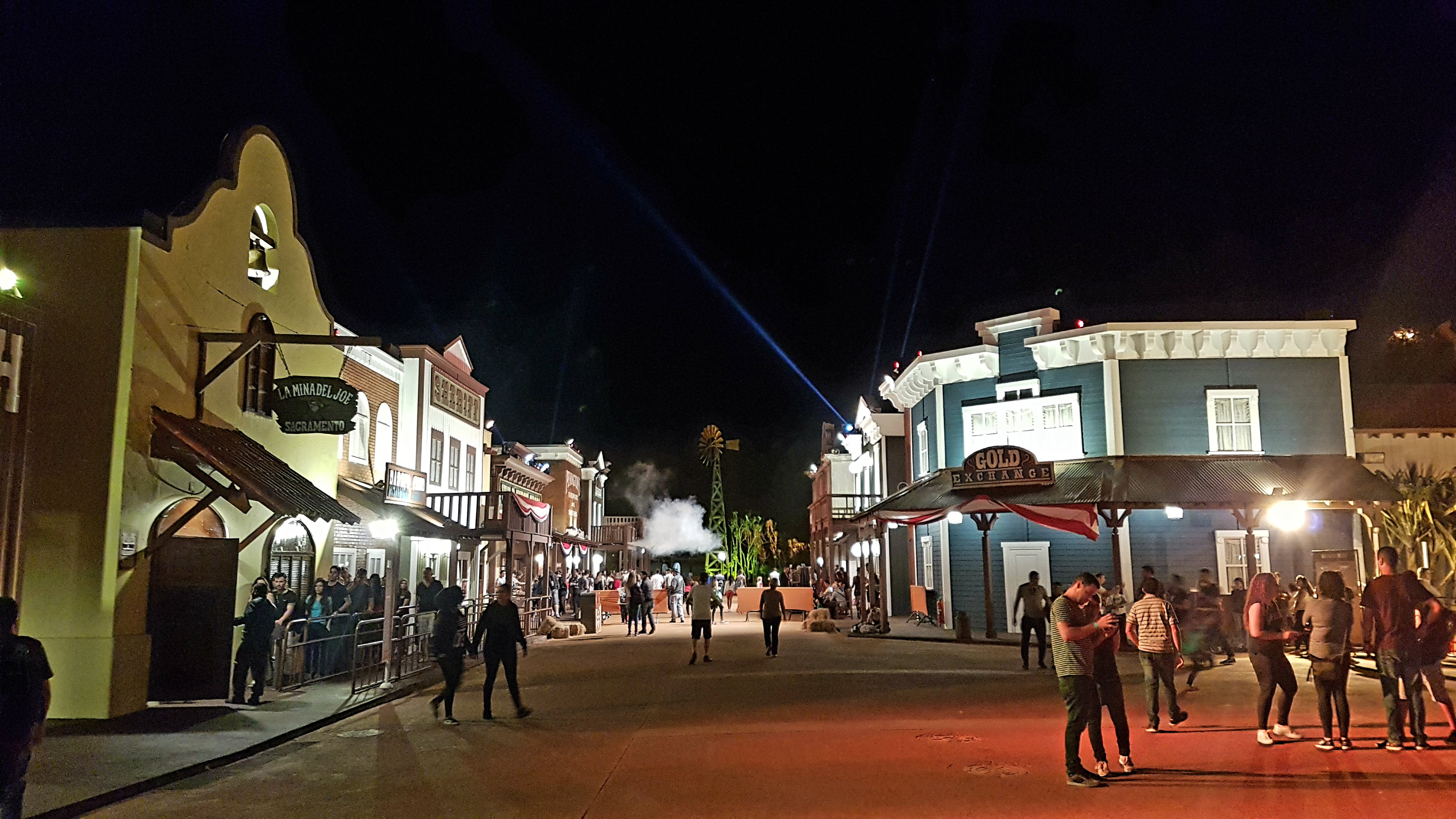 Area temática de Wild West